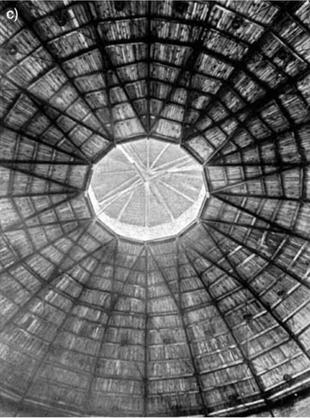 Dachkonstruktionen der Gasbehälter in der Holzmarktstraße in Berlin mit der ersten Schwedlerschen Kuppel (1863)